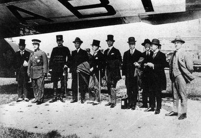 1925年8月，徐树铮（左二）率考察团抵比利时布鲁塞尔机场时留影，左一为徐道邻。